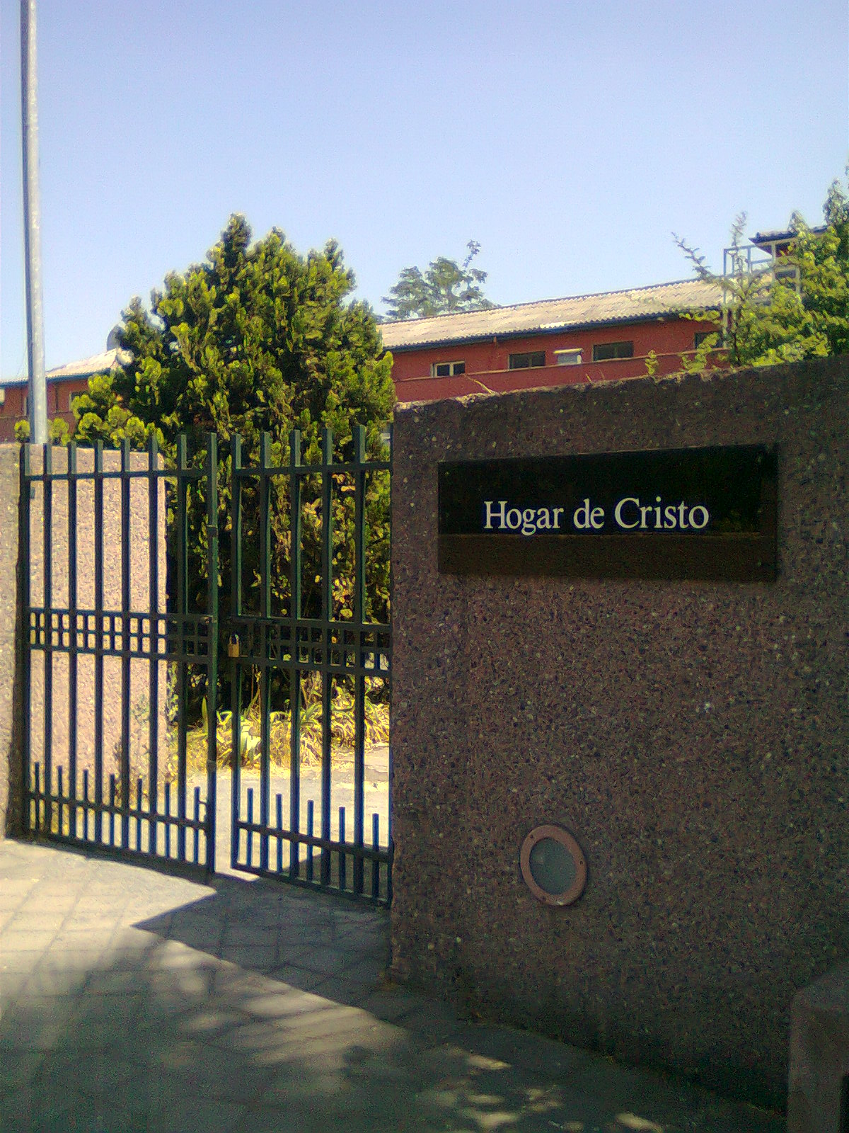 La entrada al Hogar de Cristo desde el Santuario Padre Hurtado ubicado en avenida Padre Hurtado 1090, comuna de Estación Central, en Santiago de Chile.